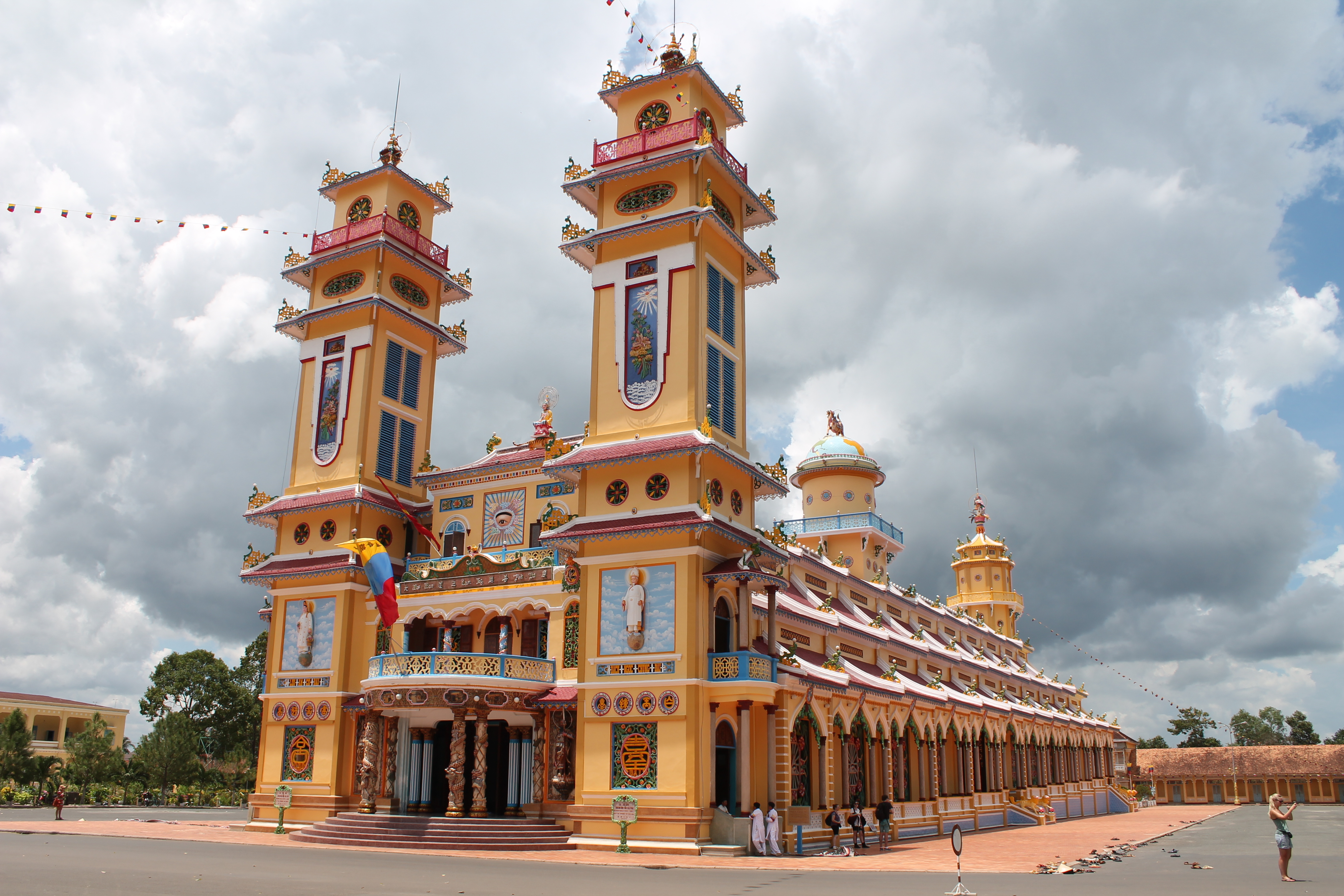 Cao Dai Temple in Tay Ninh